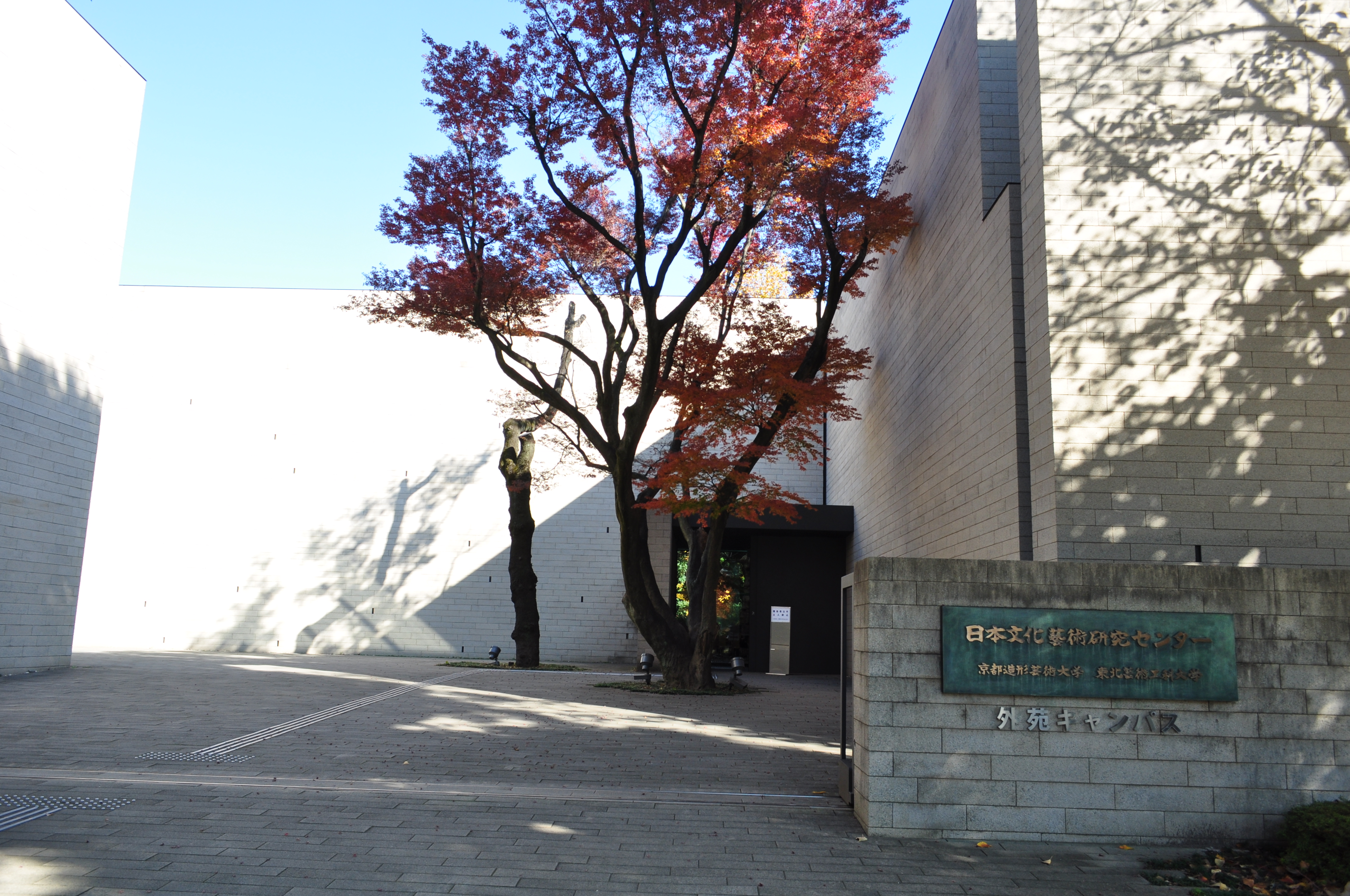 日本文化芸術研究センター。京都造形芸術大学と東北芸術工科大学が共同で設置したサテライトキャンパス。